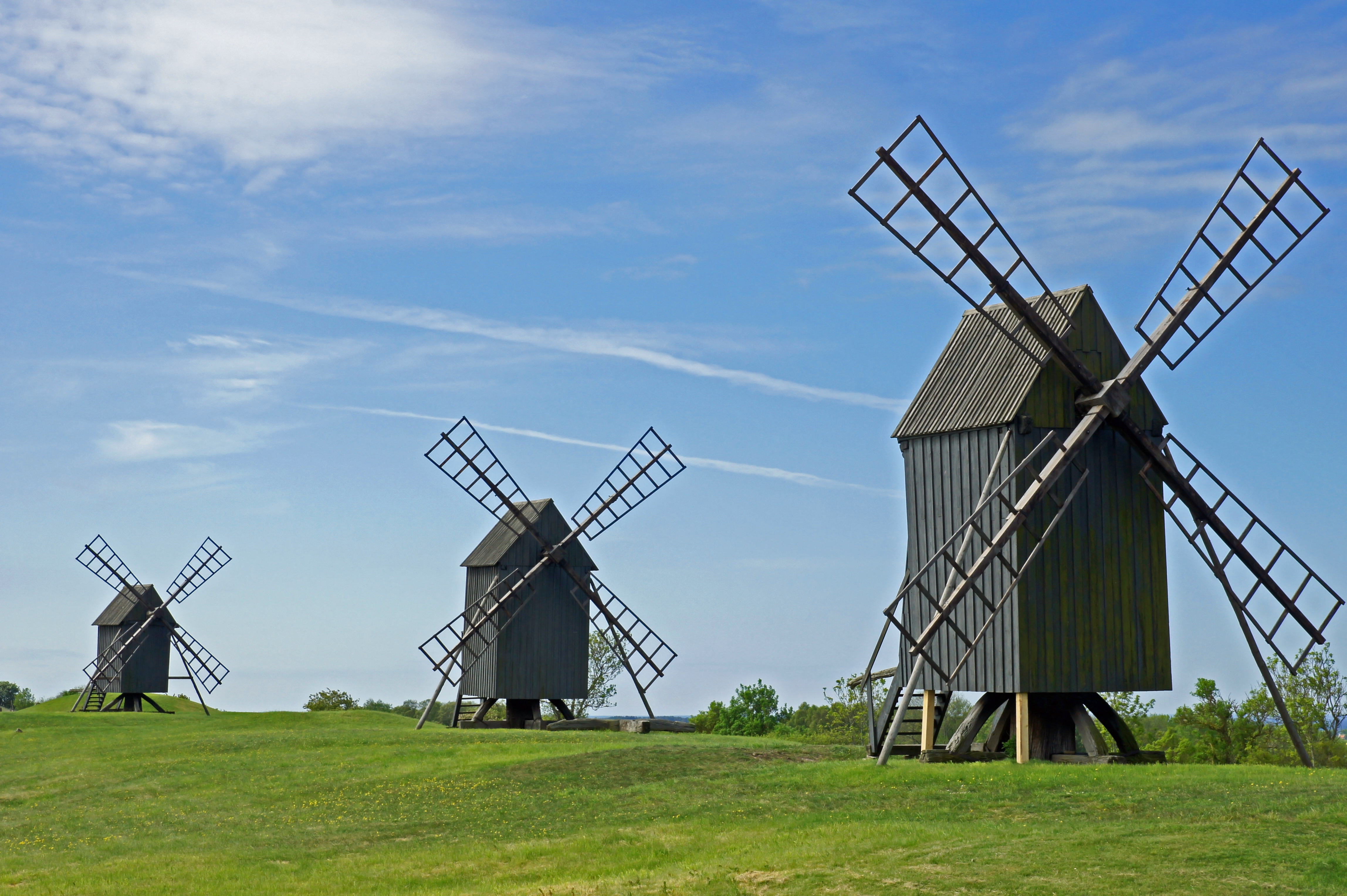 Windmill 2010-05-22 06-05 Schweden 0799 Öland, Mysinge, Stora Alvaret